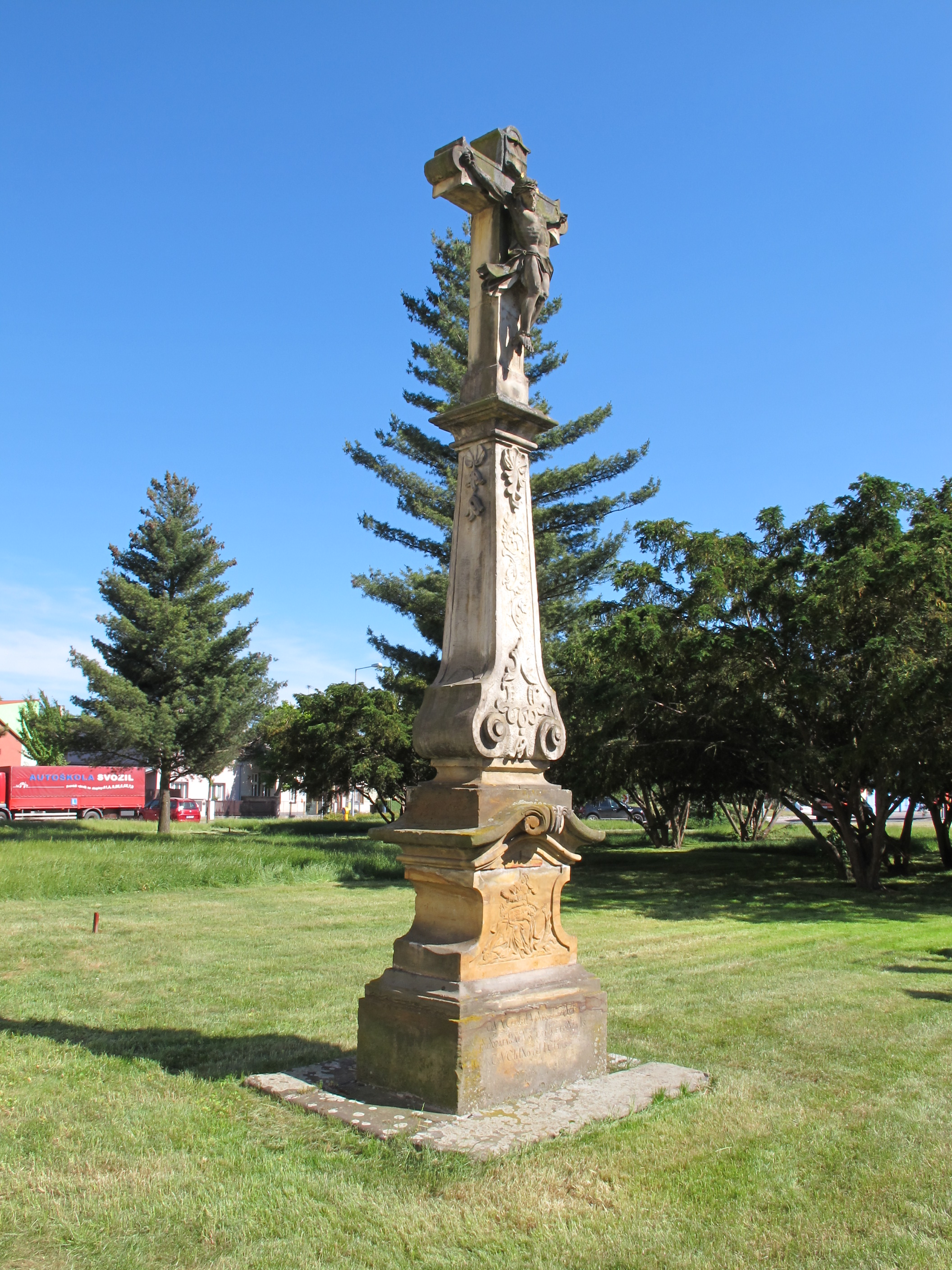 Krucifix, Staroměstské náměstí, Litovel. This file was uploaded during the project of WikiTown Litovel.